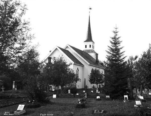 Egge kyrkje